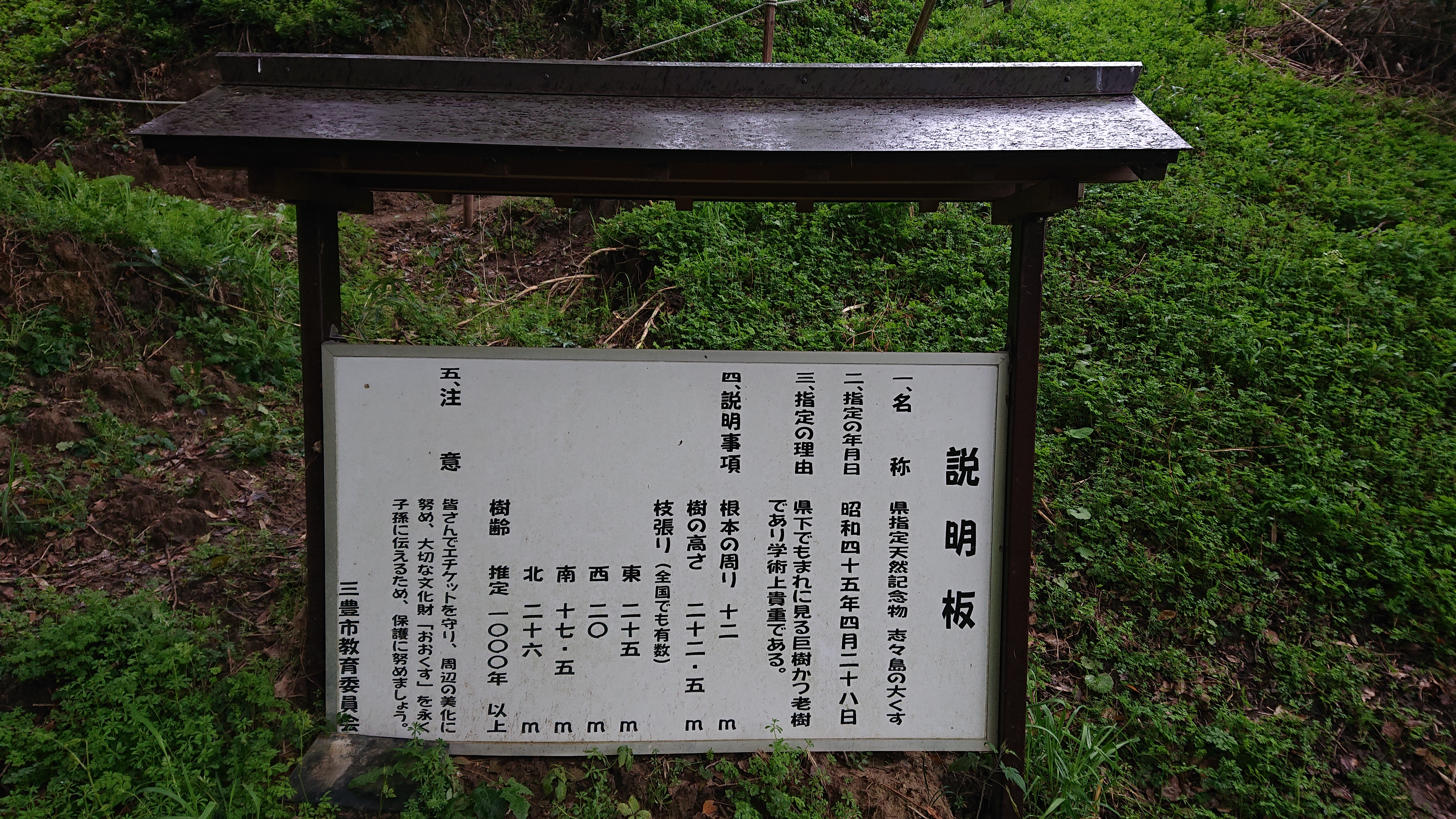 志々島にある大楠の説明板